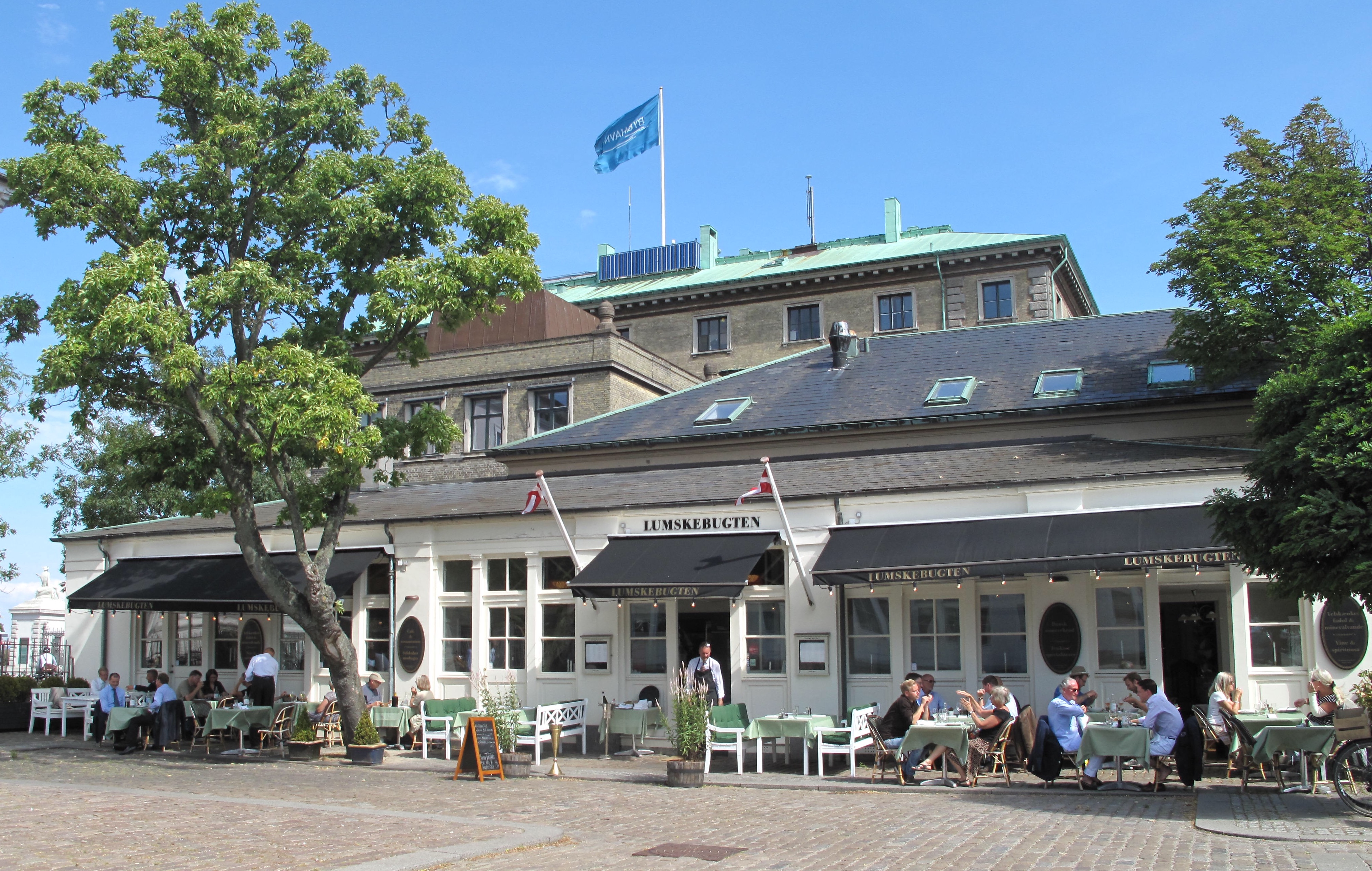 Restaurant Lumskebugten i august 2012..